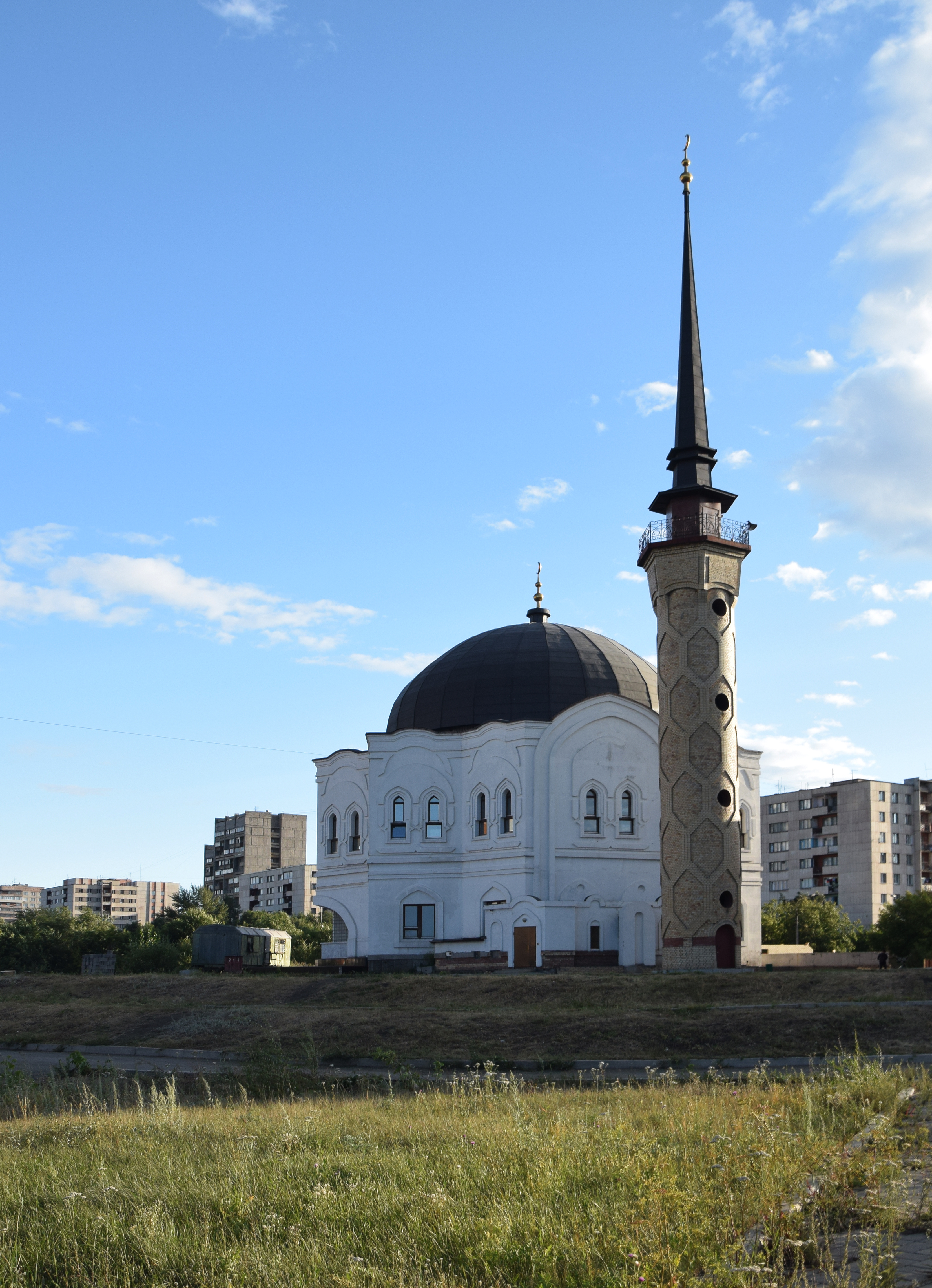 Магнитогорск, ул. Грязнова, 46